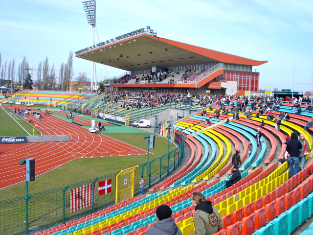 Friedrich-Ludwig-Jahn-Sportpark i Berlin (Prenzlauer Berg)